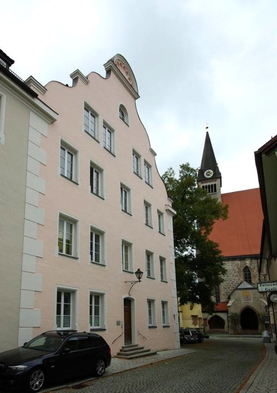 Rottmayrstr. 15, 83410 LaufenThis is a photograph of an architectural monument.